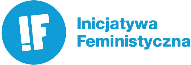 Logo Inicjatywy Feministycznej